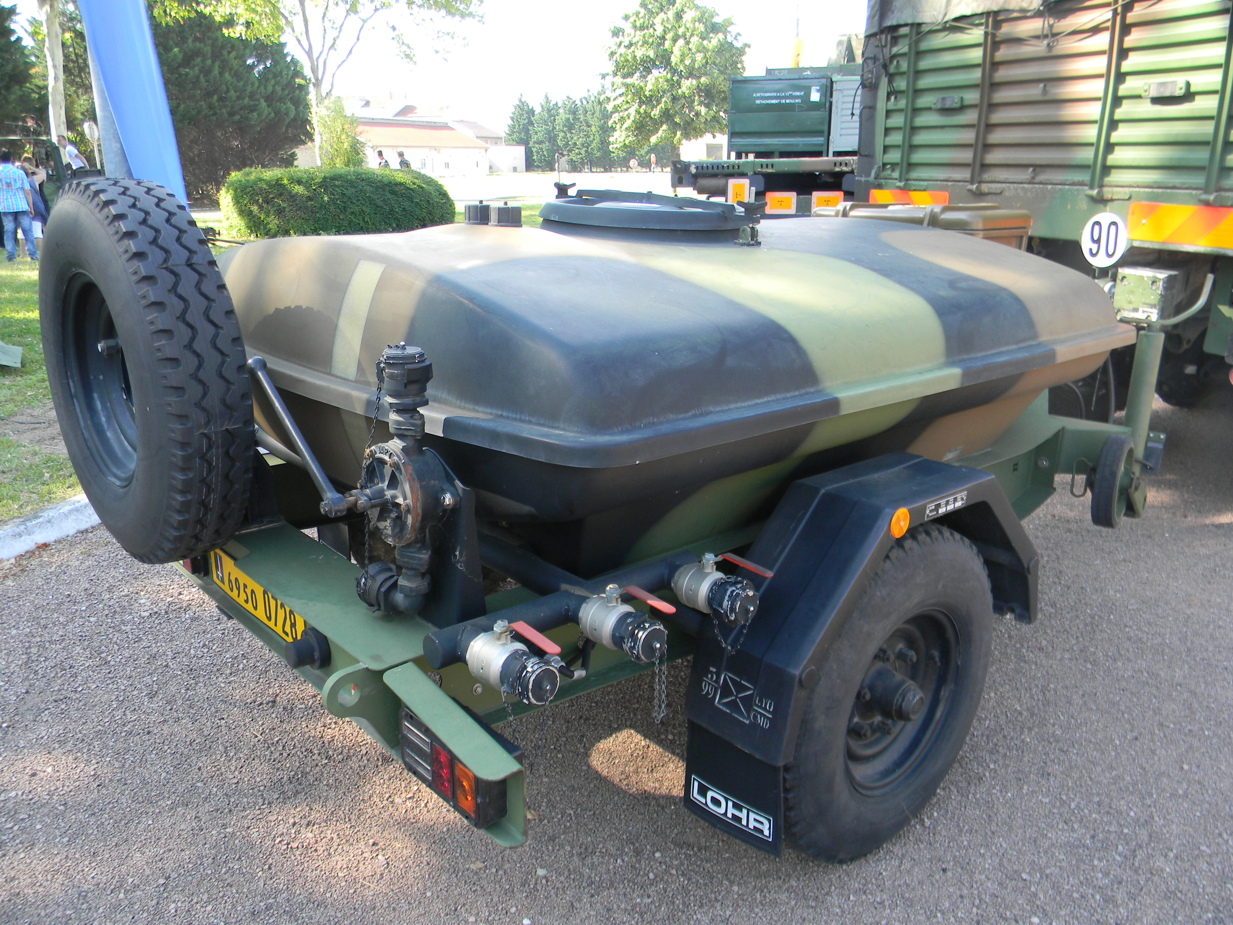 Journées portes ouvertes du quartier général Sabatier à Lyon le 15 et 16 juin 2013.Le marquage est celui de l'ancien 99e régiment d'infanterie.